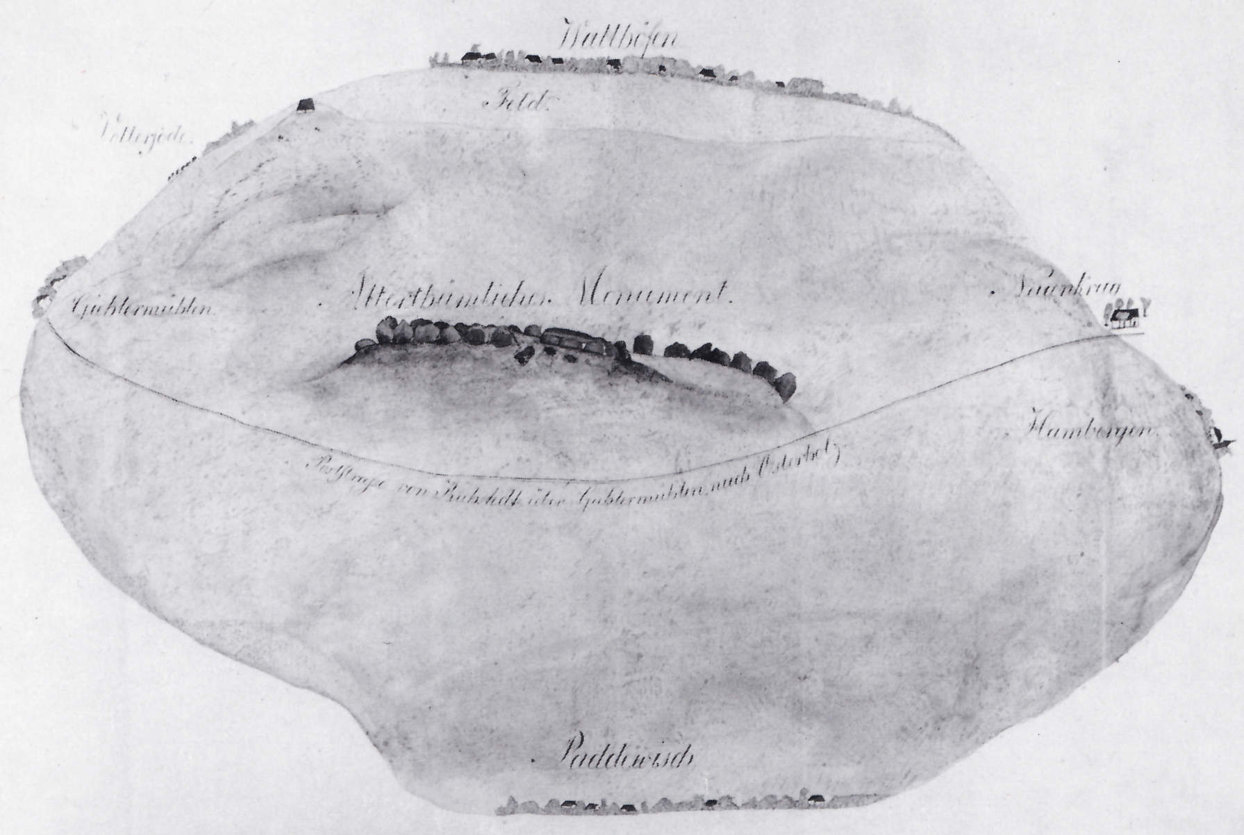 Zeichnung des im 19. Jahrhundert zerstörten Großsteingrabes Vollersode 1 (auch Großsteingrab Wallhöfen 1